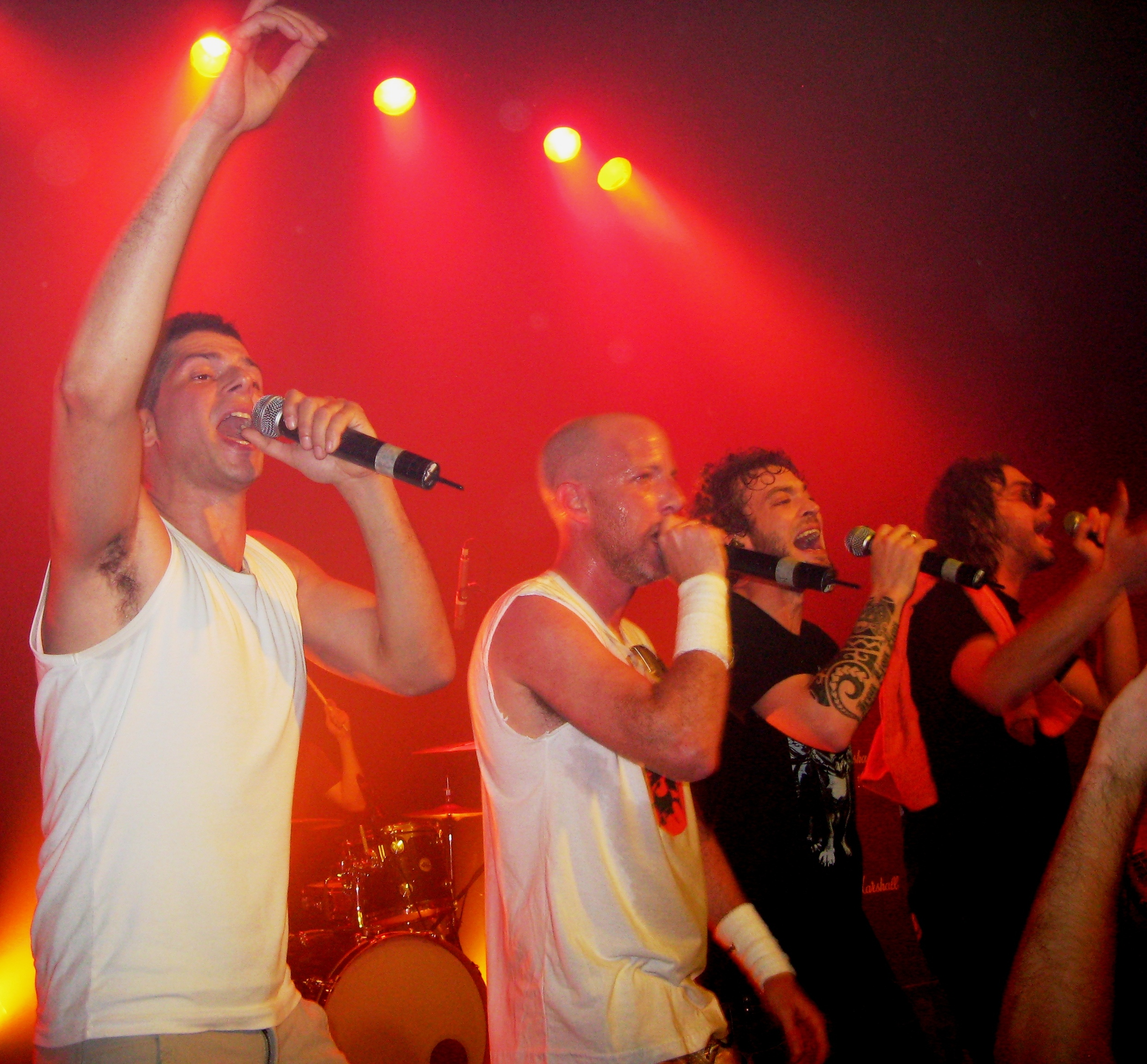 הופעה של שב"ק ס' במועדון הבארוק בבאר-שבע